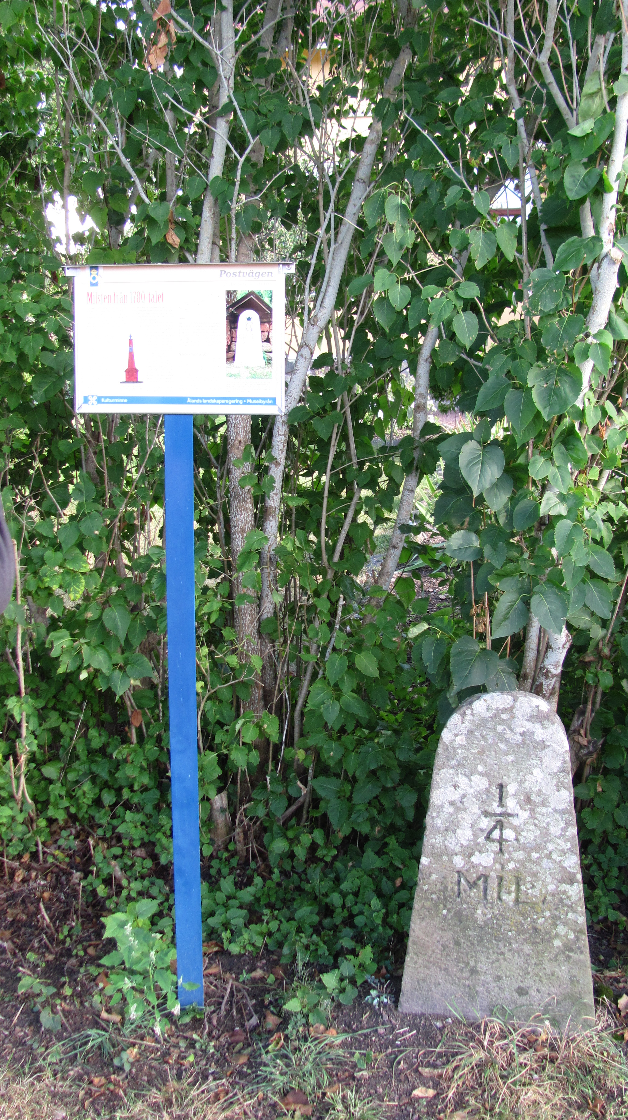 Historischer Meilenstein am ehem. Postweg auf Fasta Aland, Godby, Gemeinde Finström, Finnland